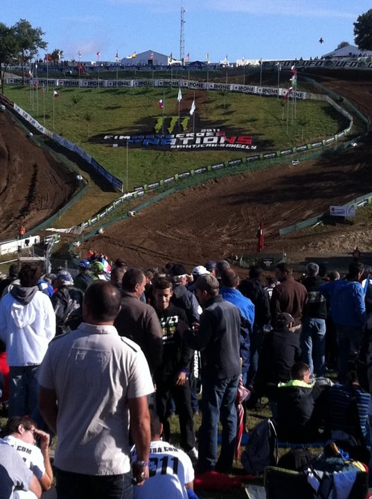 Saint-Jean d'Angely 09/2011